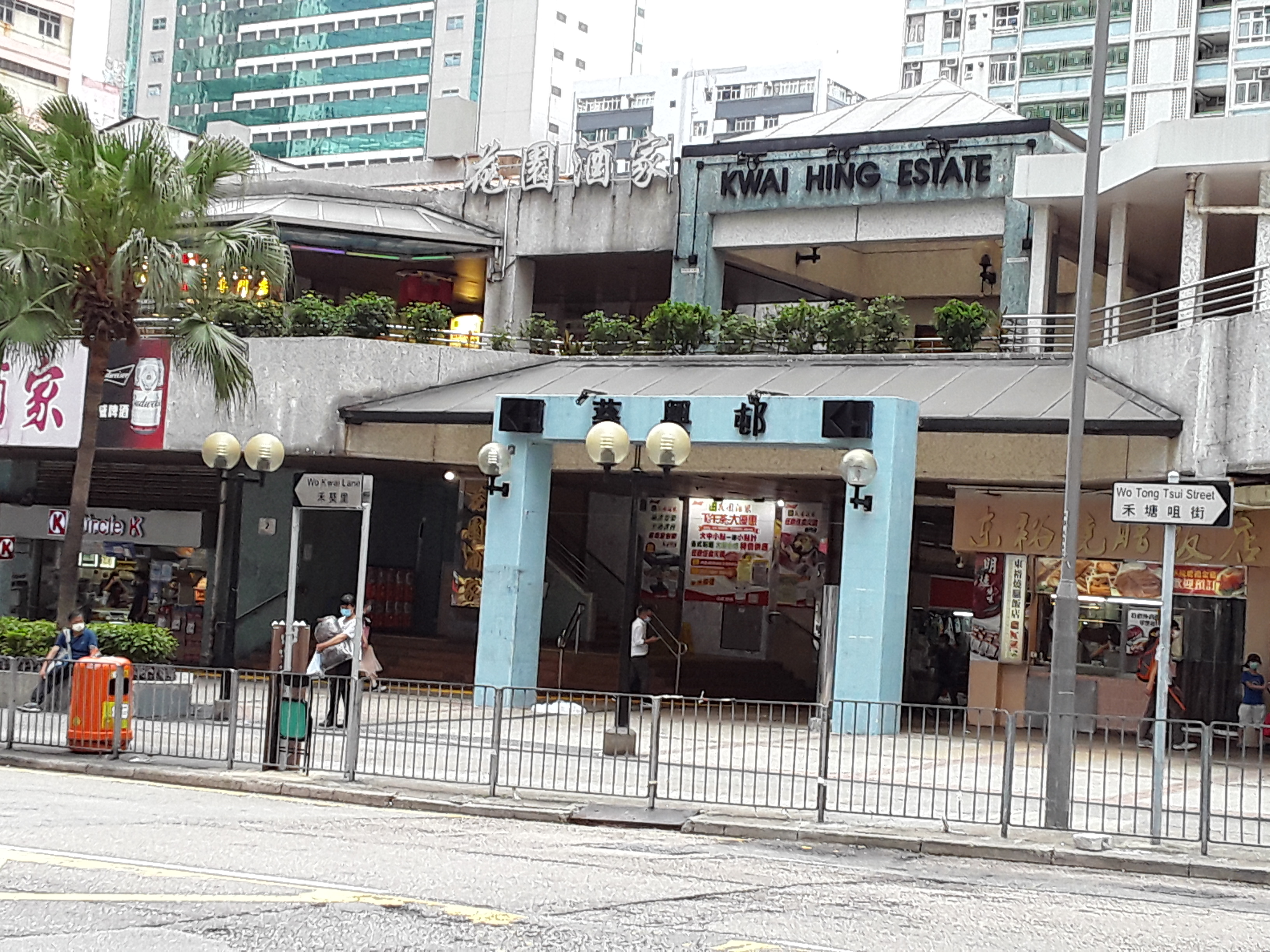 禾塘咀街與禾葵里交界